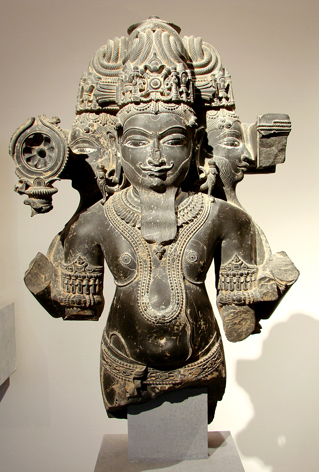 Brahma. Inde, Madhya Pradesh, 11ème - 12ème siècle, schiste bleuté. Musée Guimet, Paris.